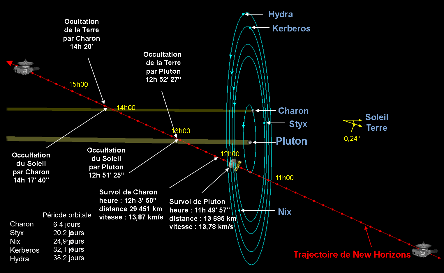 Trajectoire de New Horizons durant son survol de Pluton - version de juin 2015 (libellés en francais)